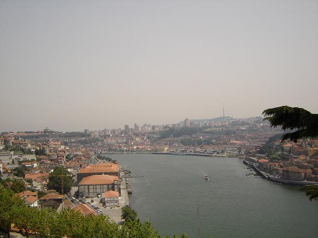 Rio Douro junto ao Porto.